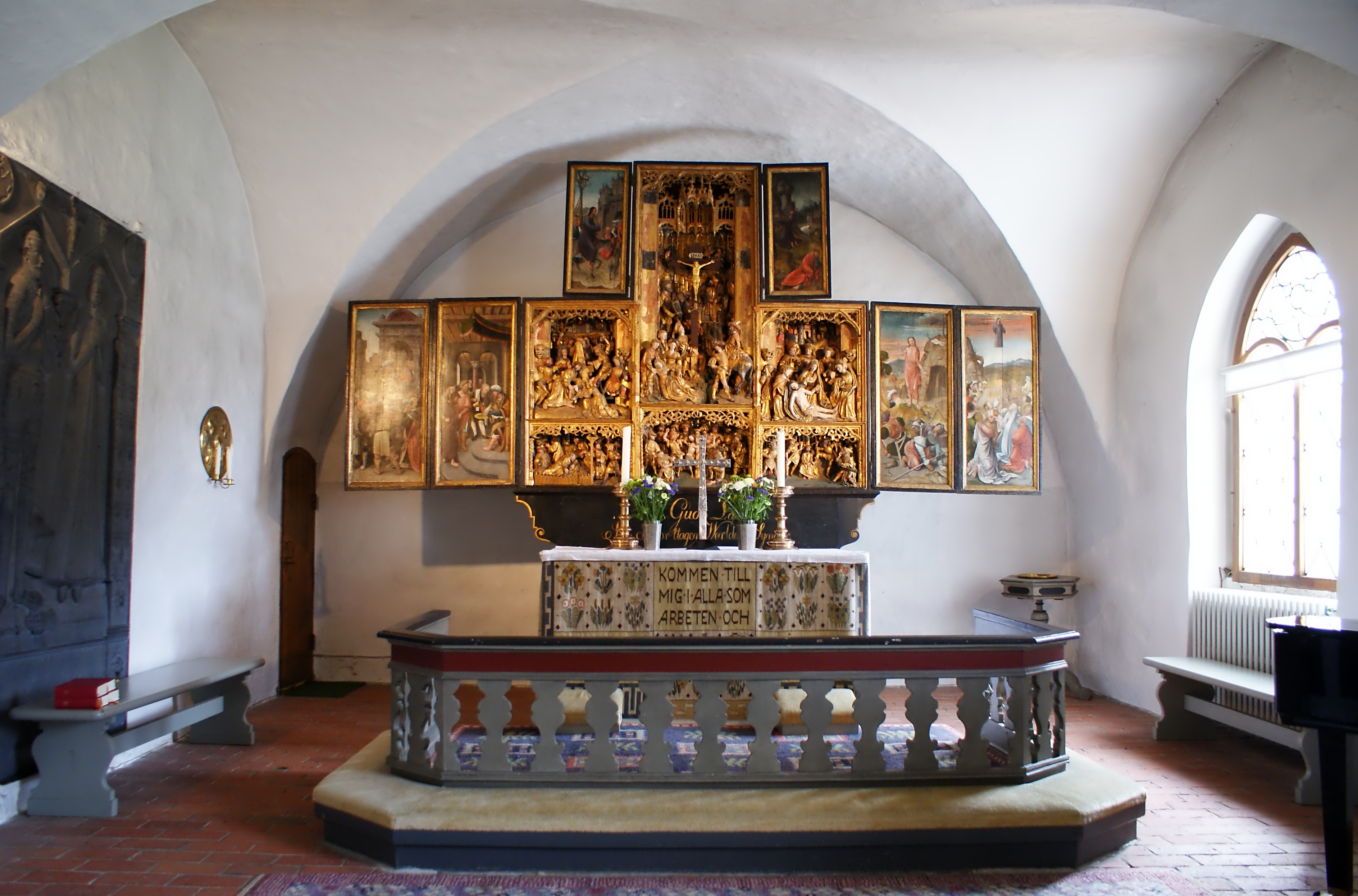 Altarsxåpet i Västra Ingelstads kyrka